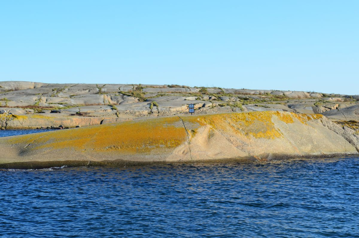 Gumserødøya er fredet og har ilandstigningsforbud i hekkesesongen for sjøfuglene.